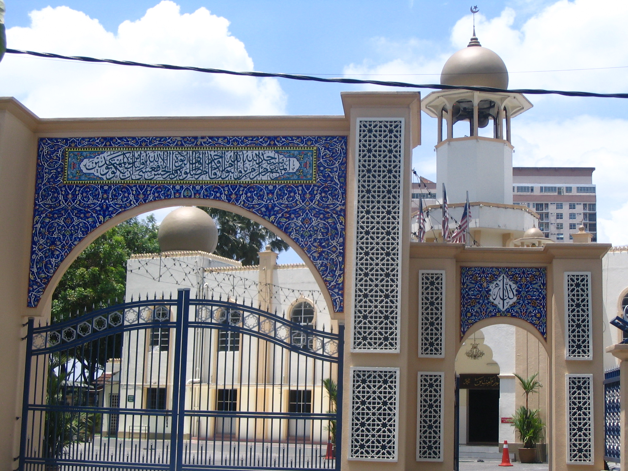 Mosquée de Kampung Baru, Kuala Lumpur, Malaise